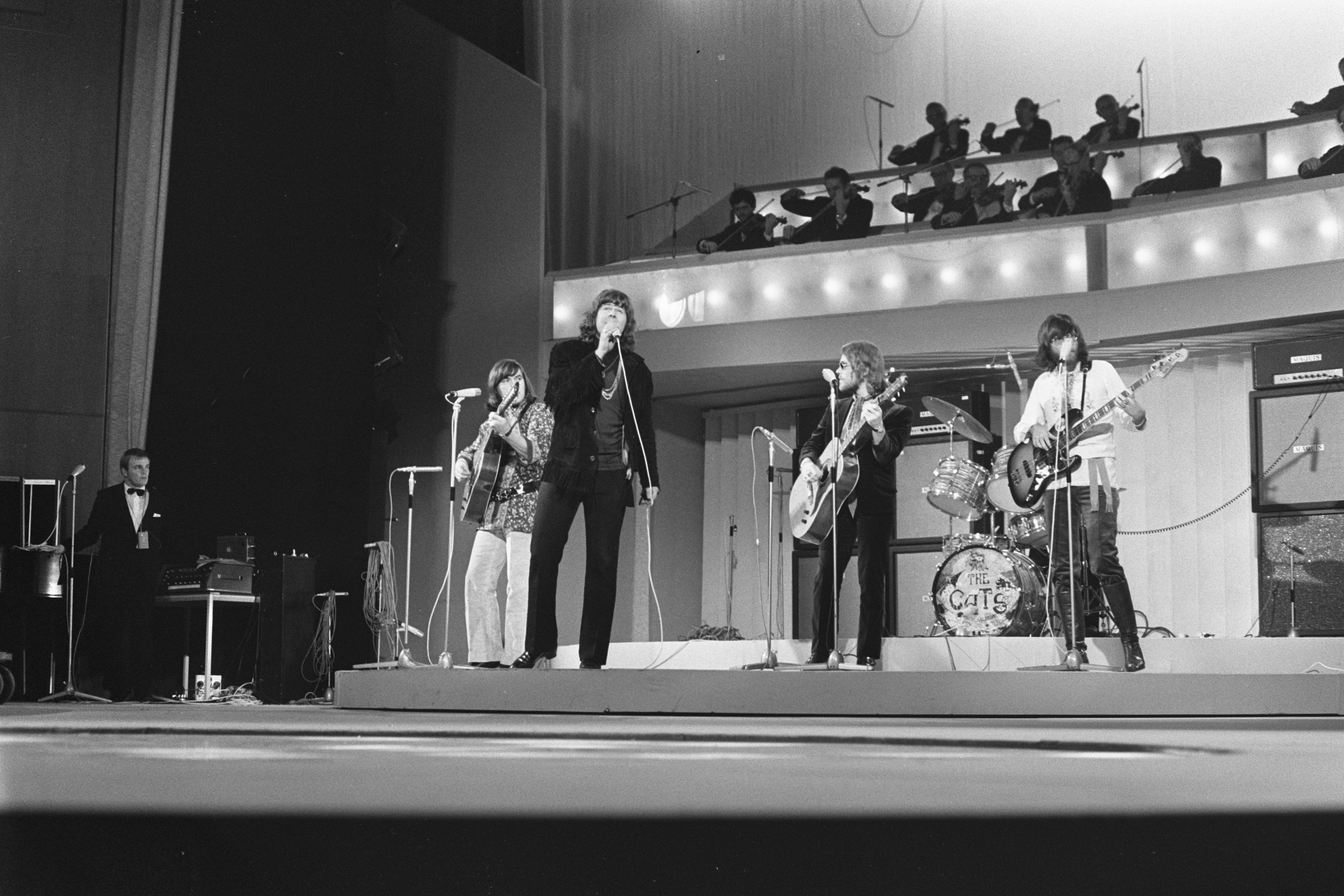 Collectie / Archief : Fotocollectie Anefo Reportage / Serie : [ onbekend ] Beschrijving : Grand Gala du Disque in RAI Amsterdam. The Cats tijdens optreden, krijgen Edison Datum : 27 februari 1970 Locatie : Amsterdam, Noord-Holland Instellingsnaam : Edison Fotograaf : Mieremet, Rob / Anefo Auteursrechthebbende : Nationaal Archief Materiaalsoort : Negatief (zwart/wit) Nummer archiefinventaris : bekijk toegang 2.24.01.05 Bestanddeelnummer : 923-3042